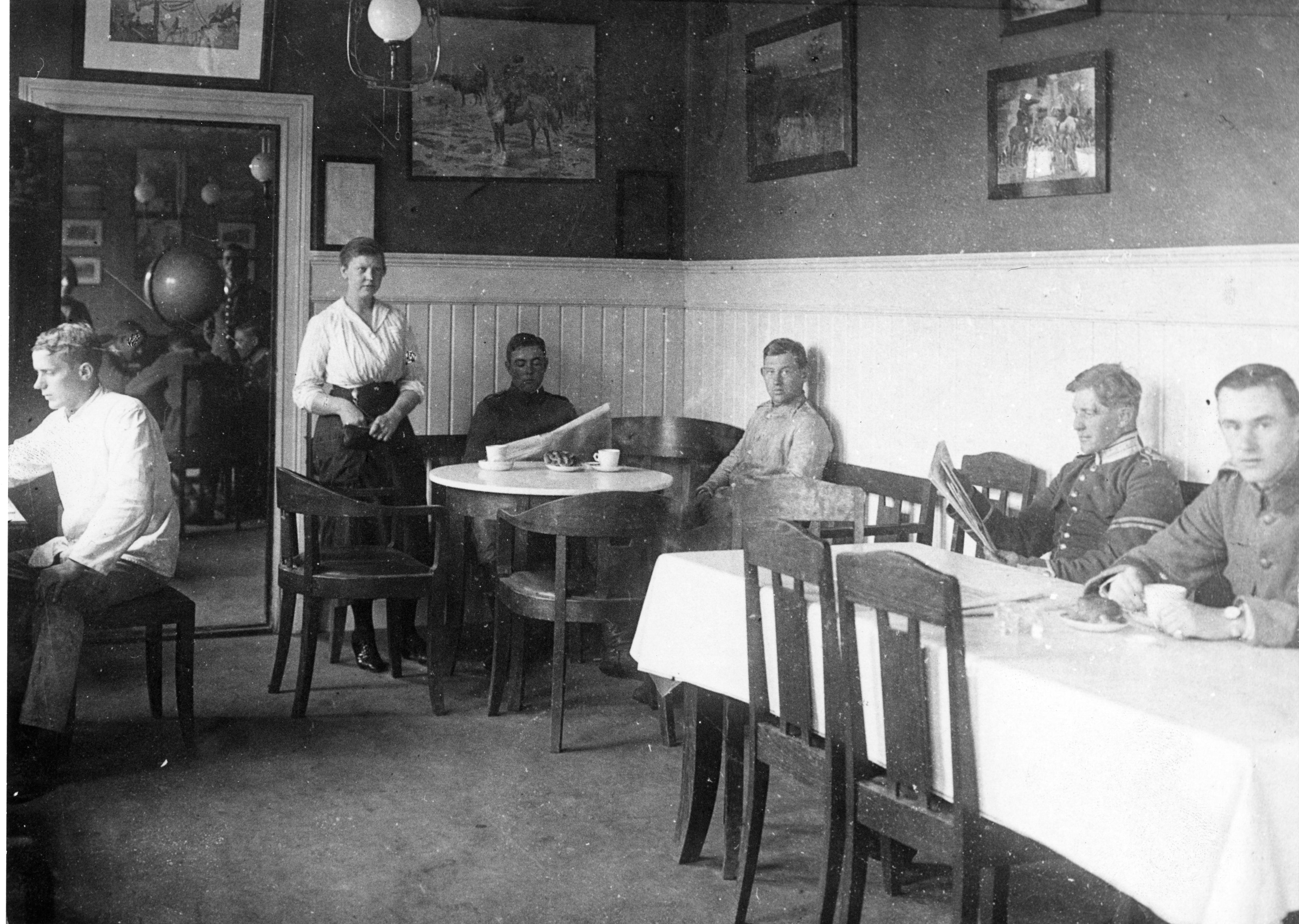 Furirmässen på K 1 under 1910-talet. Identifikationsnr: AMA.0009973 Samling: Armémuseum